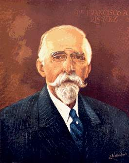 Doctor Francisco Antonio Risquez AVILAN ROVIRA, J. M.. La Gaceta Médica de Caracas, hace 100, 50, 25 años. Gac Méd Caracas [online]. 2006, vol.114, n.4, pp. 342-343. ISSN 0367-4762.